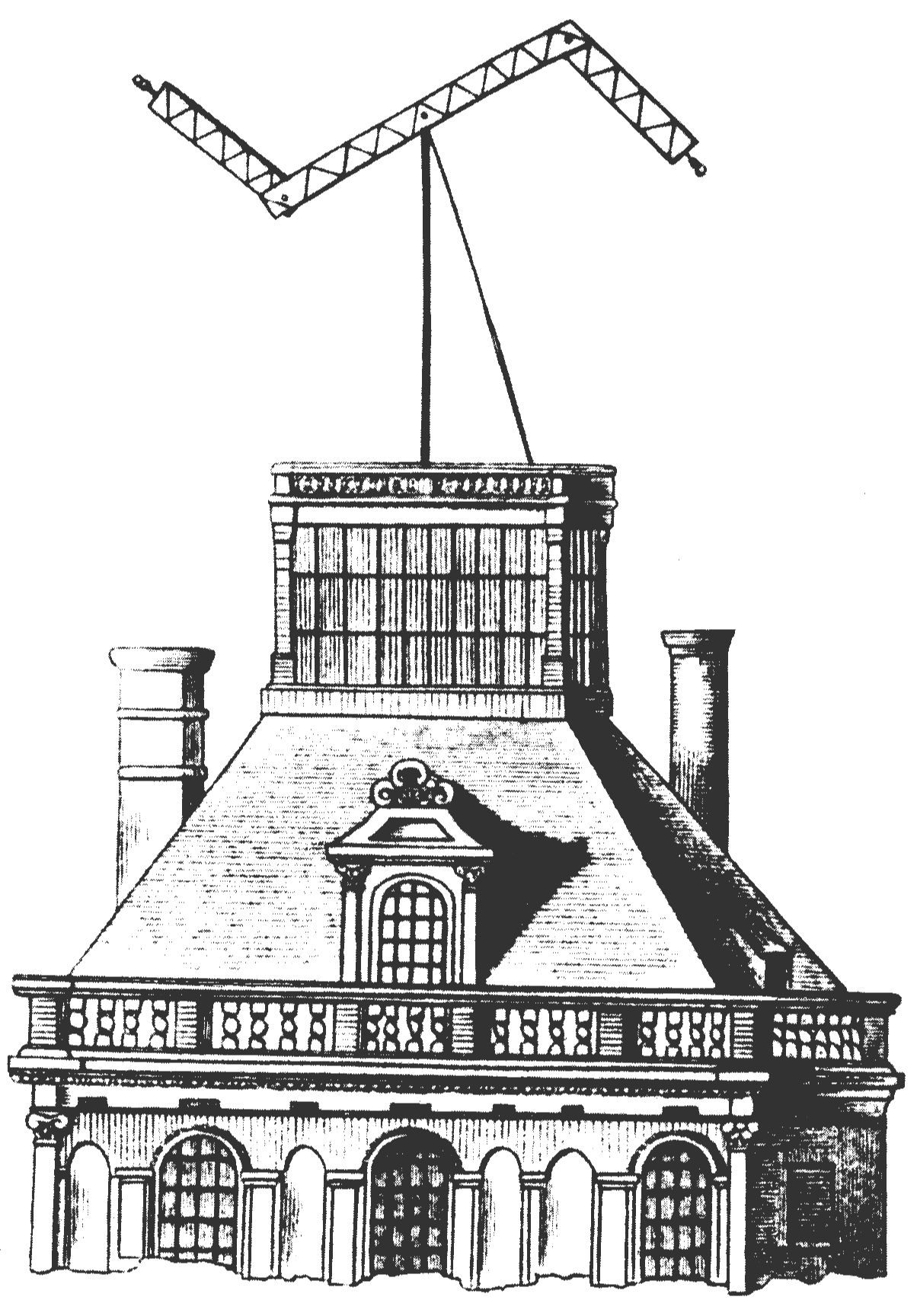 Chappe telegraf at Louvre, Paris